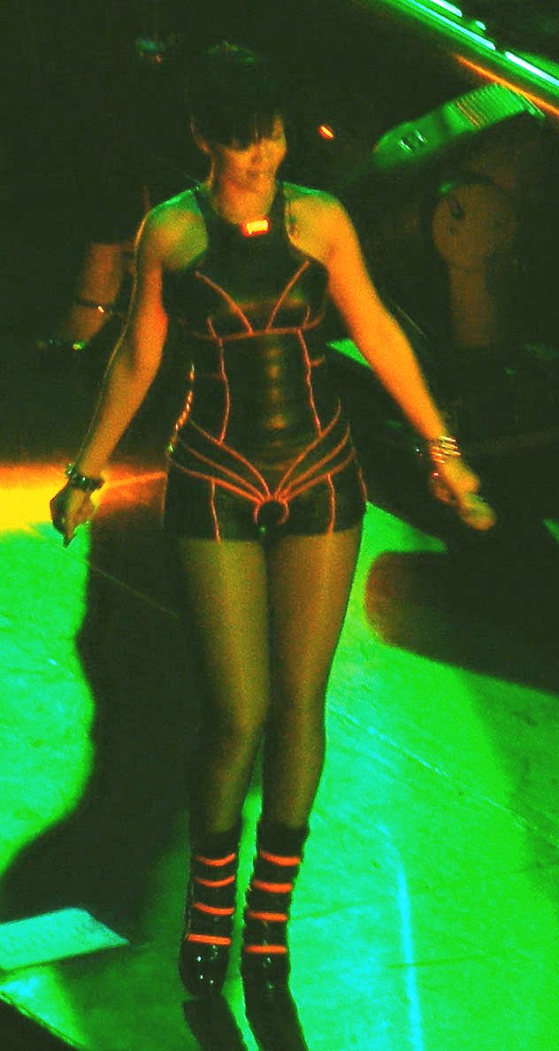 Rihanna com bon jovi no ensaio do EMA